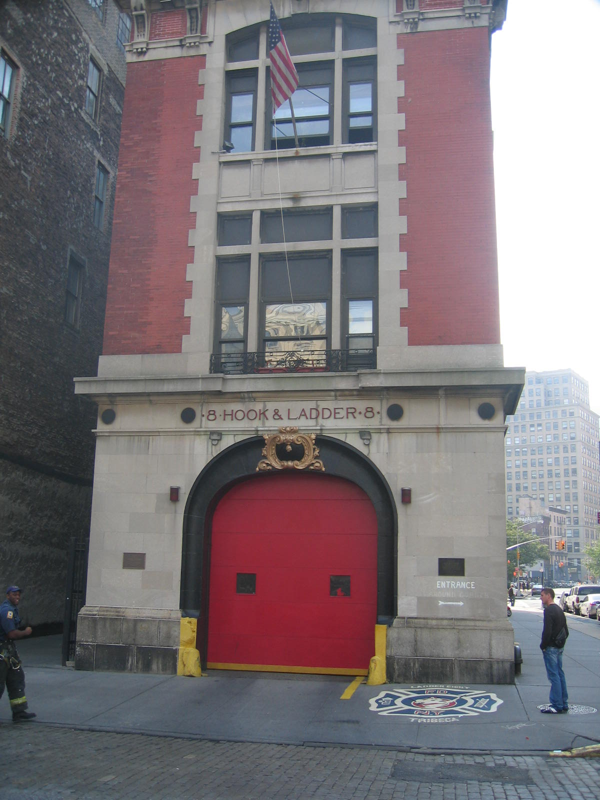 Caserne des pompiers a New York ou fut tourné SOS Fantômes.